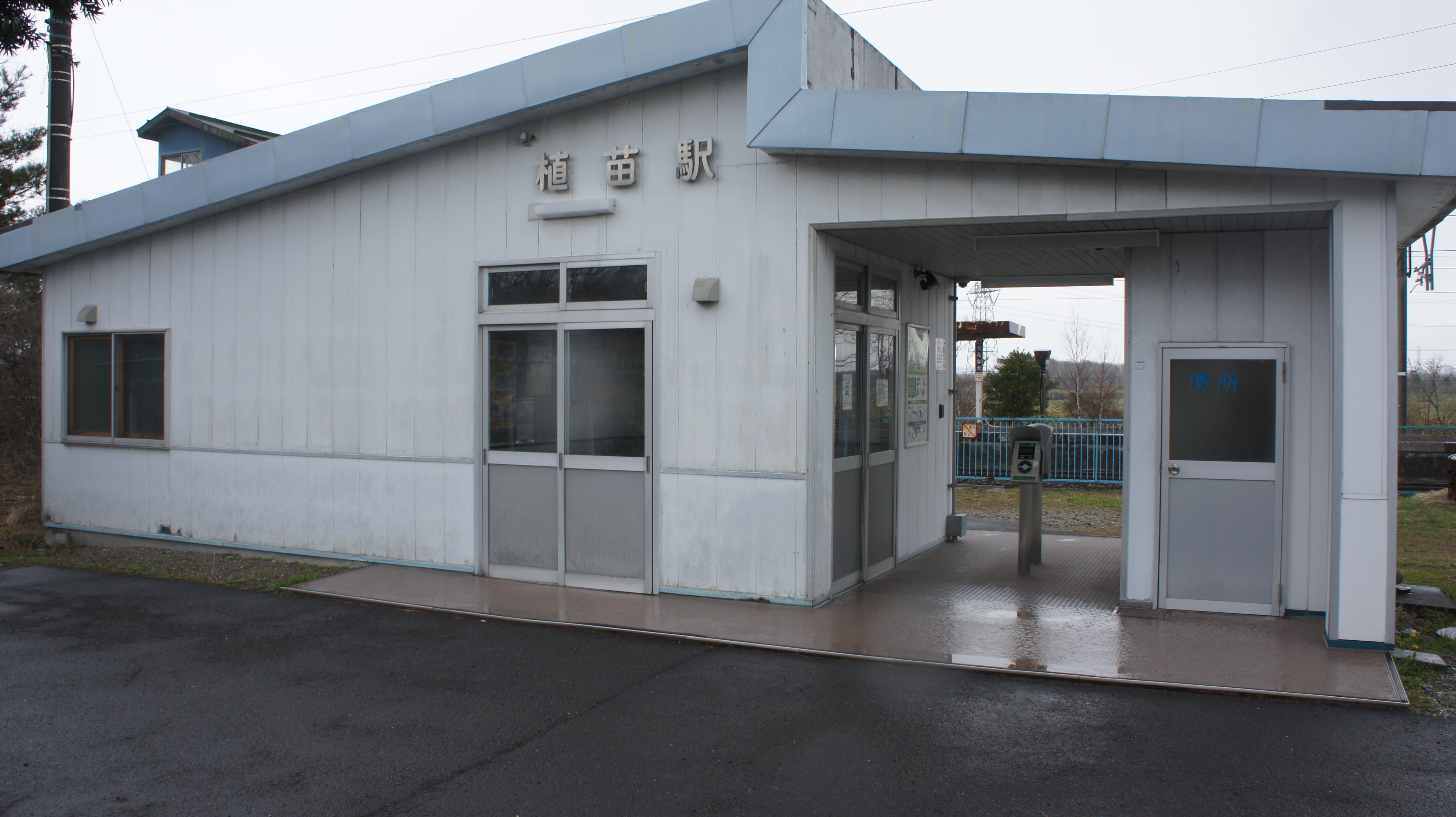 植苗駅の駅舎 Sony NEX-3